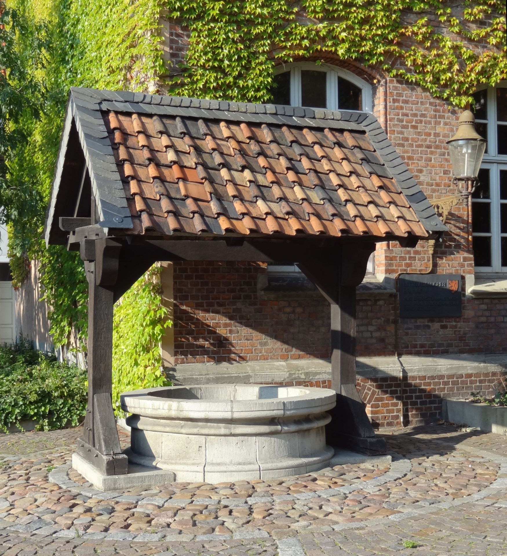 Historischer Brunnen auf dem Grundstück Heydenstraße 2 (Ecke Güldenstraße), Braunschweig. Ursprünglich ca. 1400 n.Chr. - hölzerner Aufbau mit Dach rekonstruiert.